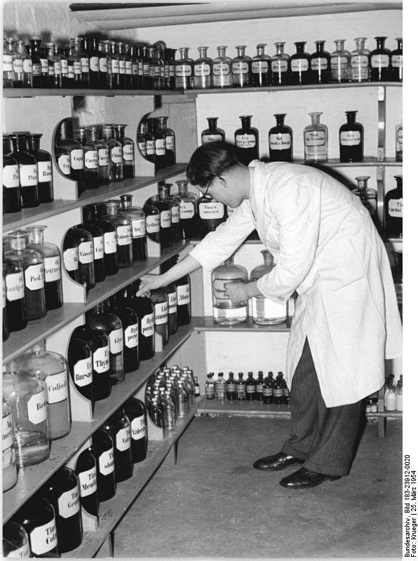 Königs Wusterhausen, Apotheke, Lager Zentralbild Krueger Wjt-Sta.-Ho. 23 Mot. 25.3.1954 "Märkische Apotheke" Königs Wusterhausen sichert die Versorgung der Landbevölkerung mit Medikamenten und Arzneien Die "Märkische Apotheke" in Königs Wusterhausen ist zu einem wichtigen Bindeglied zwischen Arzt und Patienten geworden. Diese staatlich verwaltete Apotheke gibt durch ihre vorbildlichen Einrichtungen, dem qualifizierten Fachpersonal und der darüber hinaus in den Laboratorien geleisteten wissenschaftlichen Arbeit, dem Arzneimittelempfänger die Gewähr für die Abgabe richtig dosierter Medikamente hochwertiger Qualität. Als Ausbildungsstätte für den Nachwuchs auf dem Gebiet des Apothekenwesens und der Pharmazie ist die "Märkische Apotheke" Königs Wusterhausen, die 1953 ihren Neubau in der Nähe des Bahnknotenpunktes Königs Wusterhausen beziehen konnte, in den Mittelpunkt des Interesses auf dem Gebiete des Gesundheitswesens gerückt. UBz: Keinen Mangel an Medikamenten und Arzneimitteln durch gute Bevorratung und Planung hat die "Märkische Apotheke". Apothekenassistent Wolfgang Brandenburg überpfrüft die Vorräte im Arzneikeller. Kollege Brandenburg wird an der Humboldt-Universität Berlin studieren. Ho.